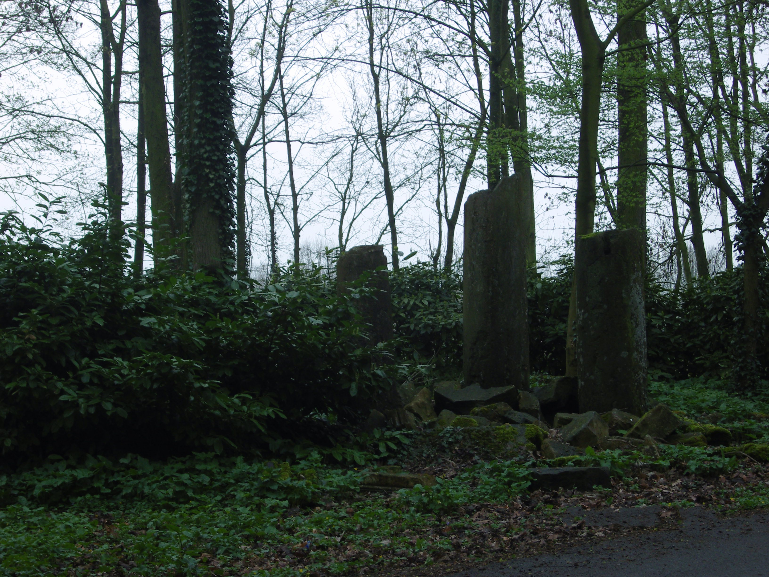 Vestiges de l'Abbaye d'Anchin à pecquencourt